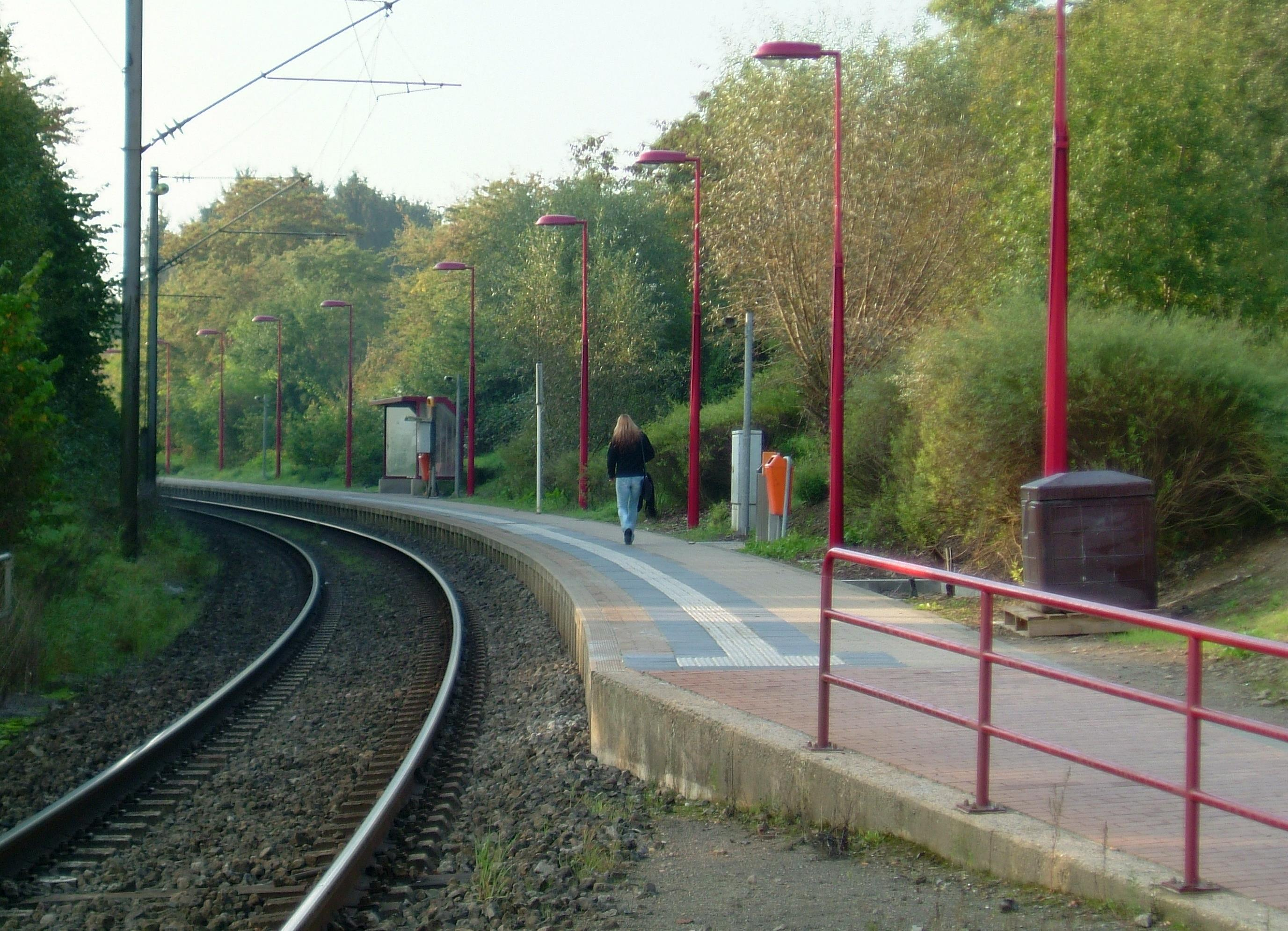 CFL-Halt Bireng/Diddeleng